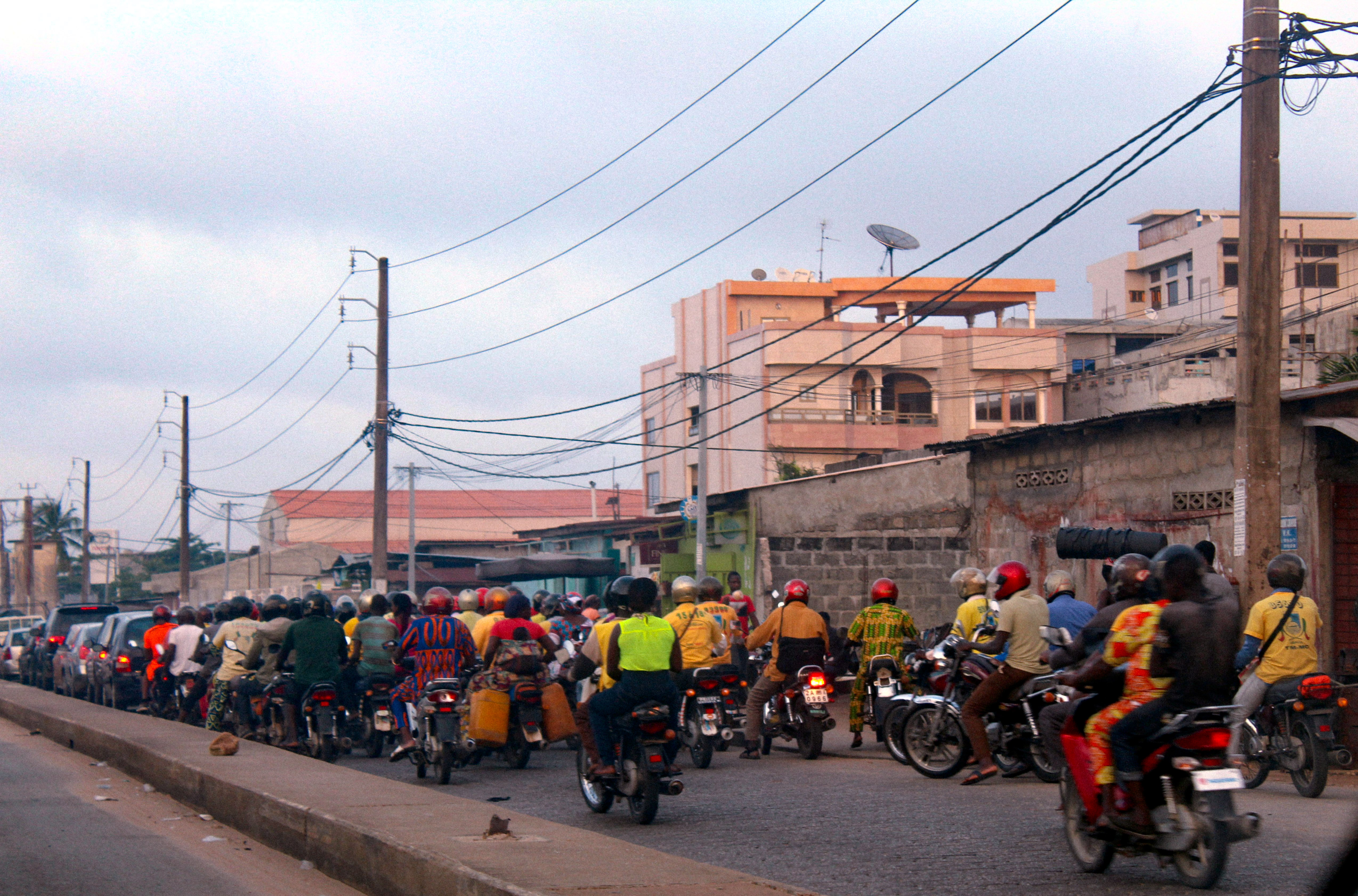 Embouteillage sur une bretelle à Cotonou. This is an image with the theme "Africa on the Move or Transport" from: Benin